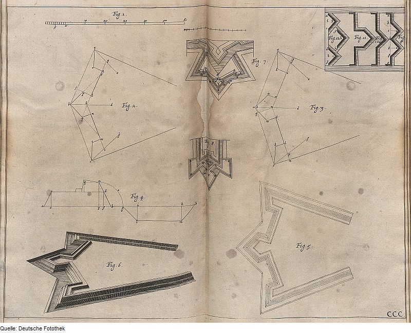 Original image description from the Deutsche Fotothek Festungsbau & Ravelin & Kronwerk